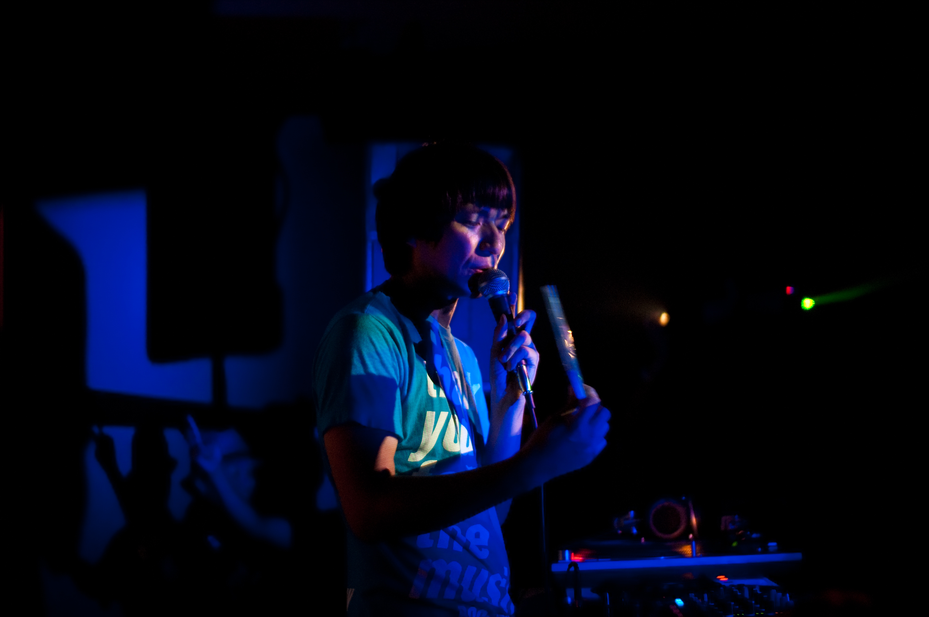 Guest DJ: ROCKETMAN (Ryo Fukawa)